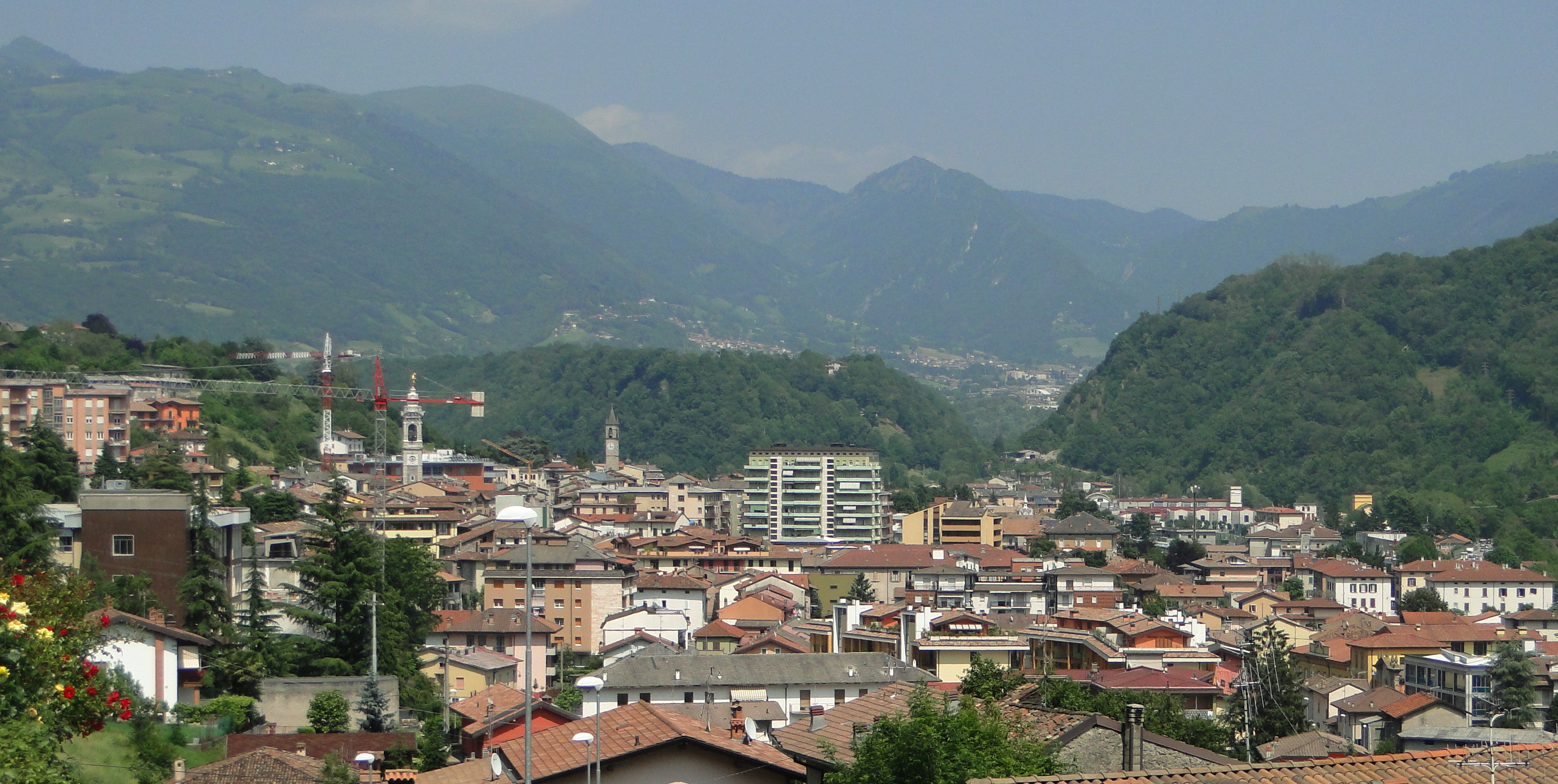 paesaggio di Gazzaniga (BG), Italia